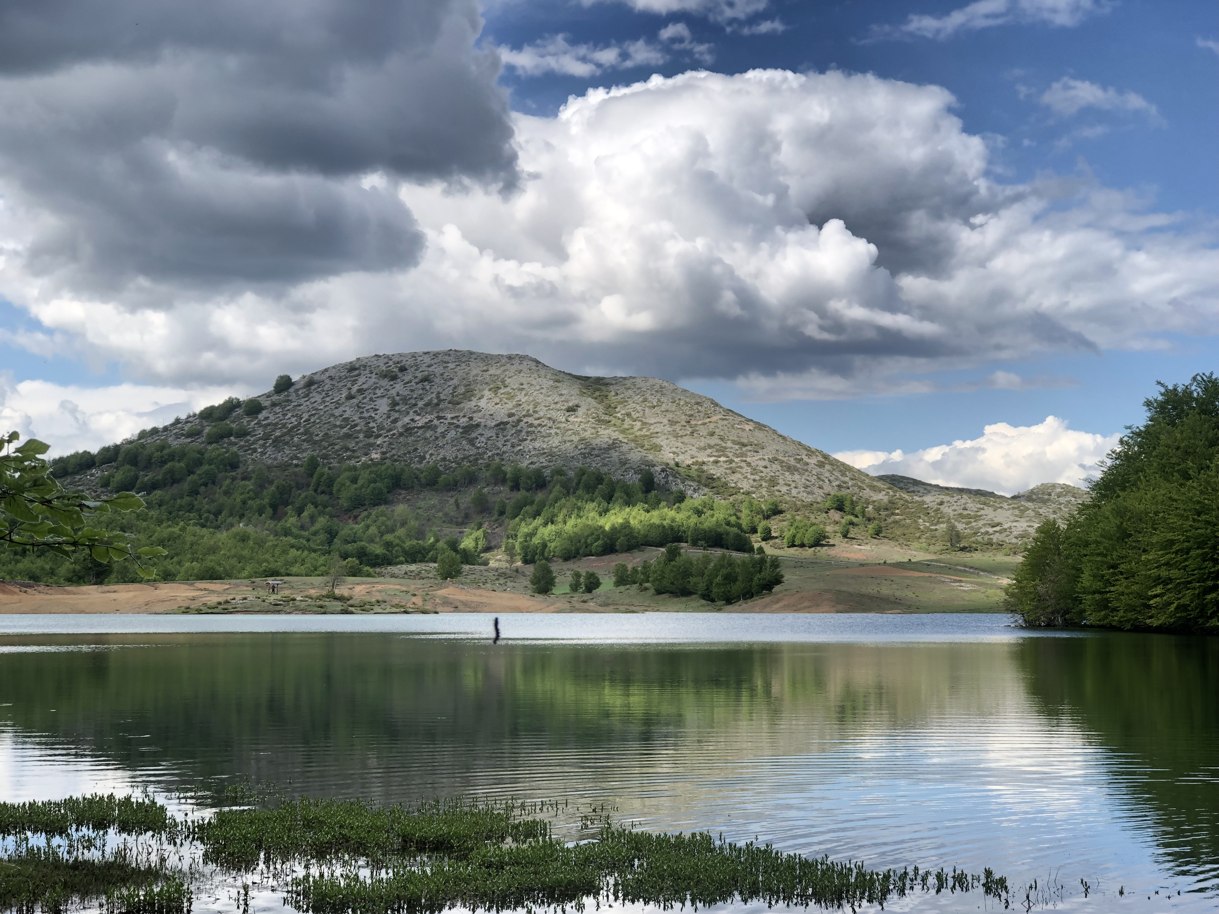 Shebenik-Jabllanice, Librazhd, Bulqize